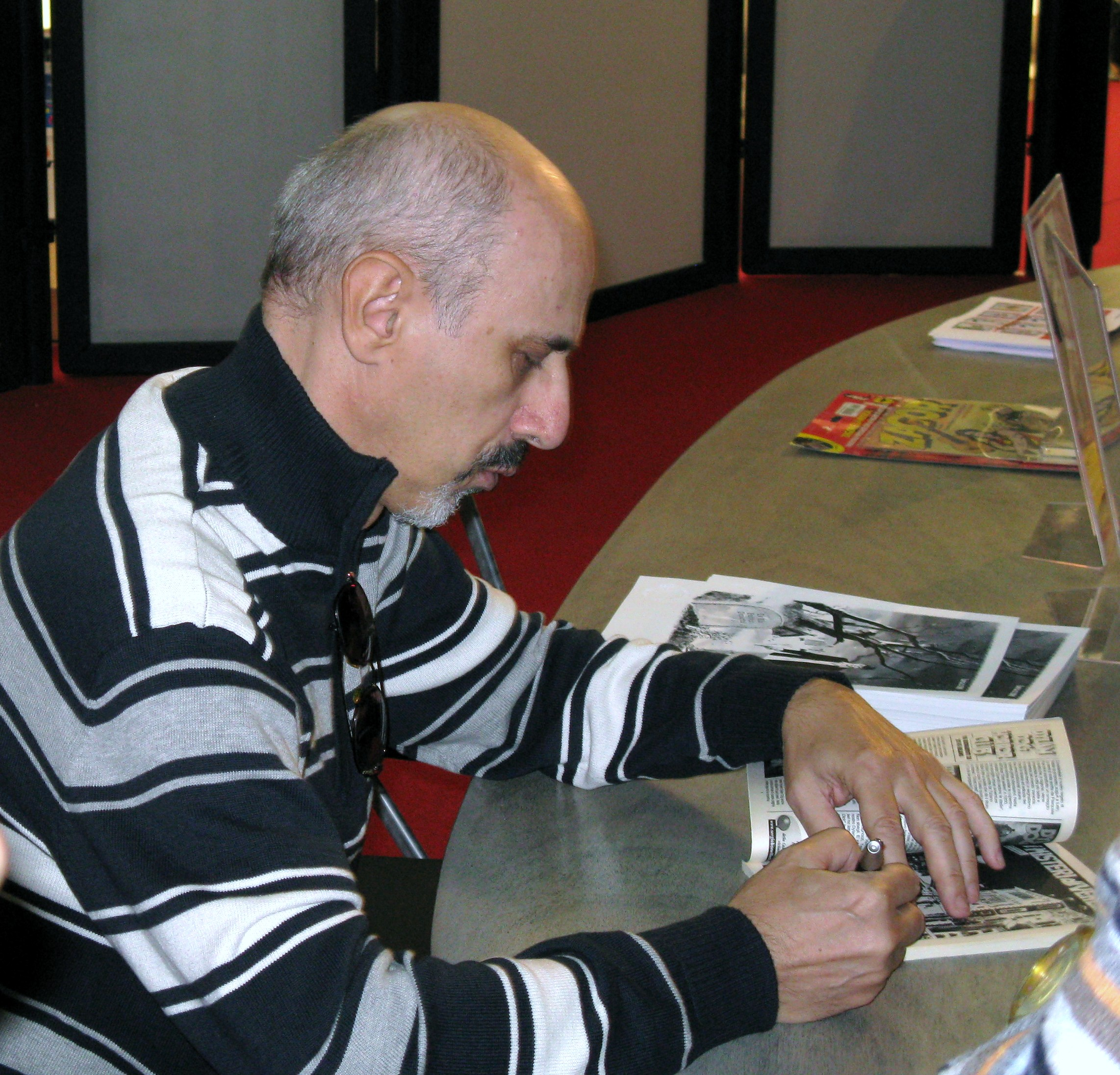 Angelo Stano al Lucca Comics 2009